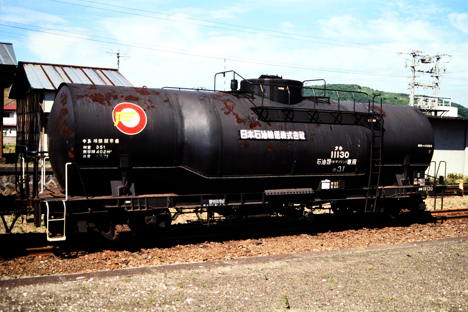 タキ11000形タキ11130。日本石油輸送所有。本輪西駅にて。